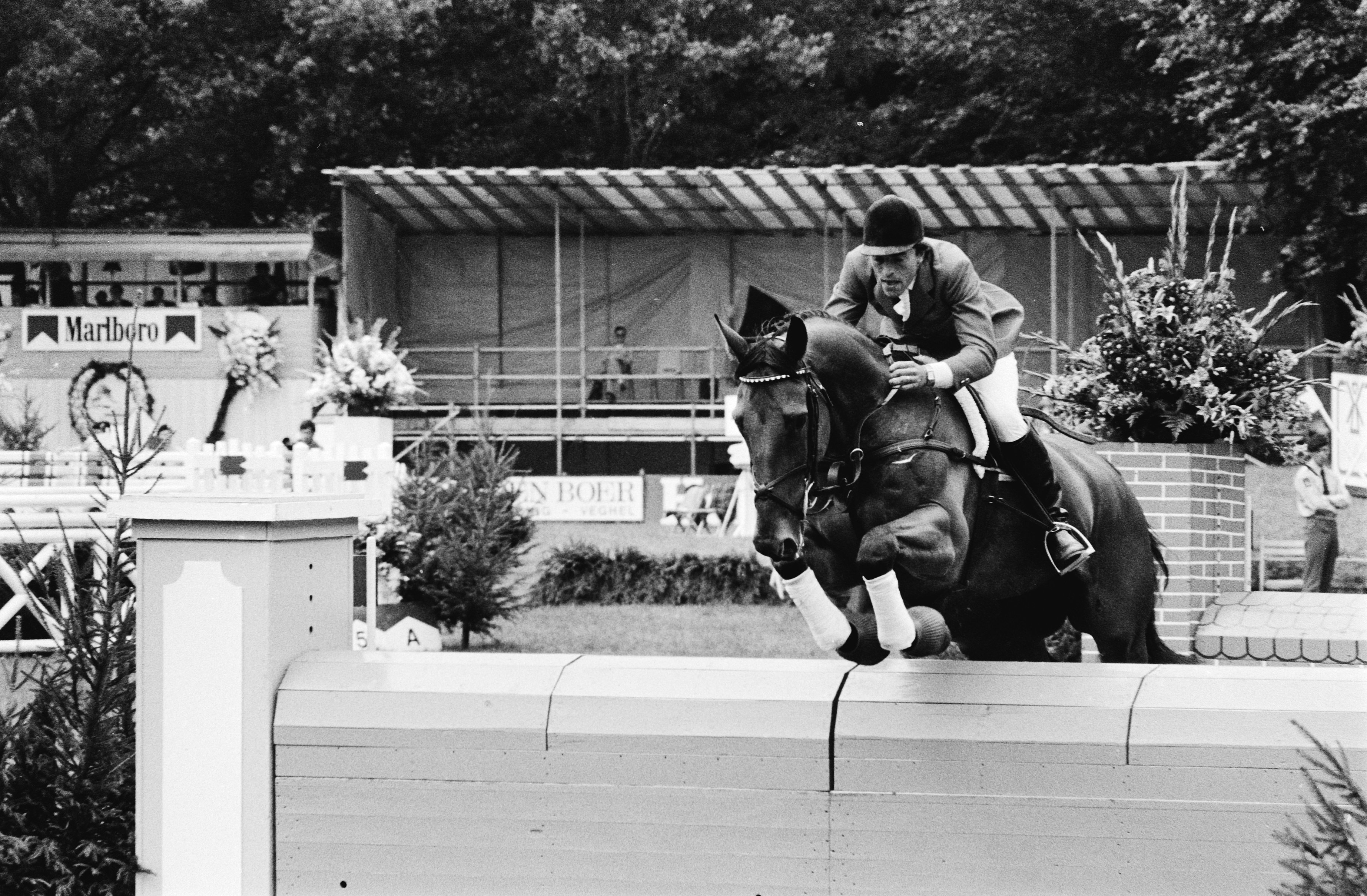 Depicted person: Henk Nooren – Dutch equestrian